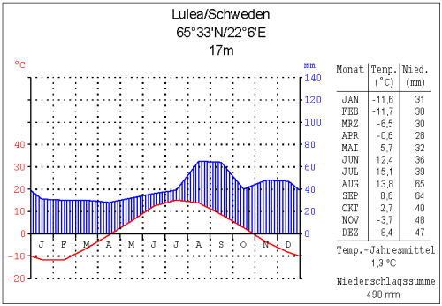 Klimadiagramm Lulea